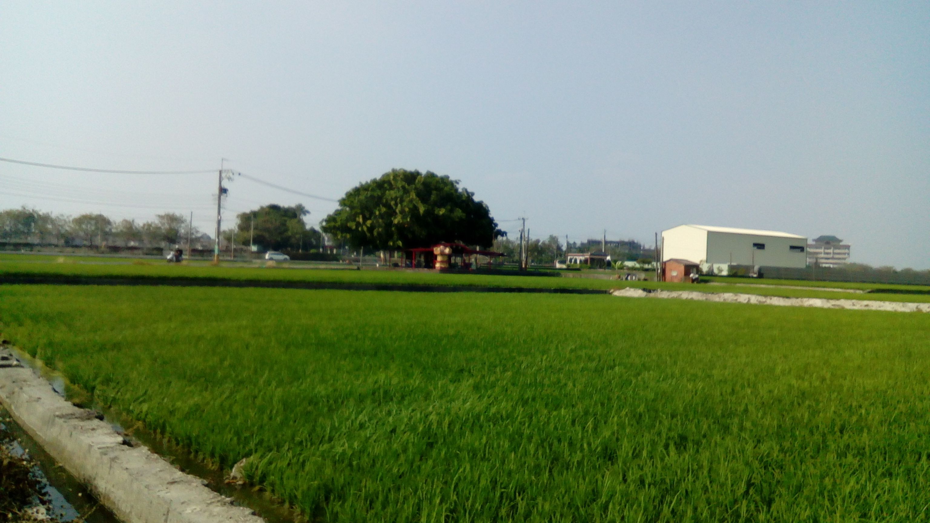 同上 位於地藏寶塔東南側的田園 樹下為土地公廟